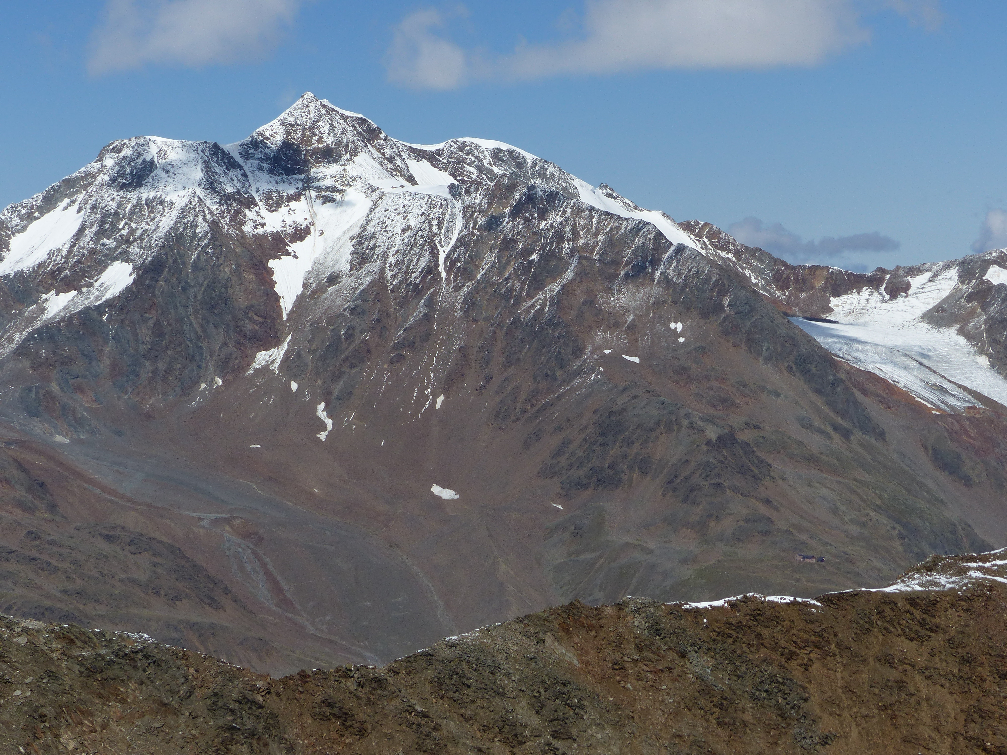 Wildspitze mit Mitterkar und Breslauer Hütte (Blick vom Kamm unterhalb der Kreuzspitze)